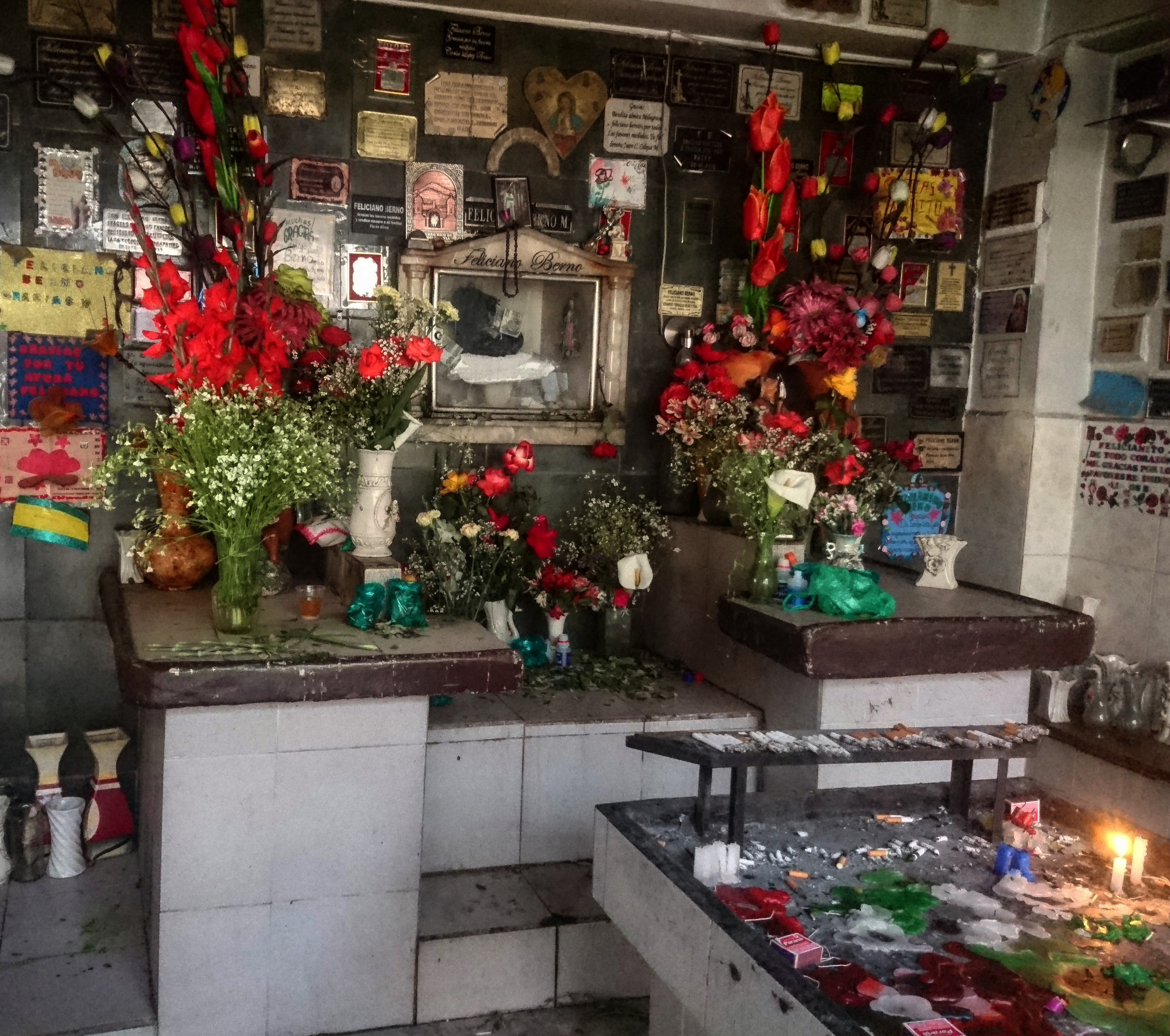 Cementerio General de Potosí This medium shows the protected monument with the number P/F0-001 in Bolivia.